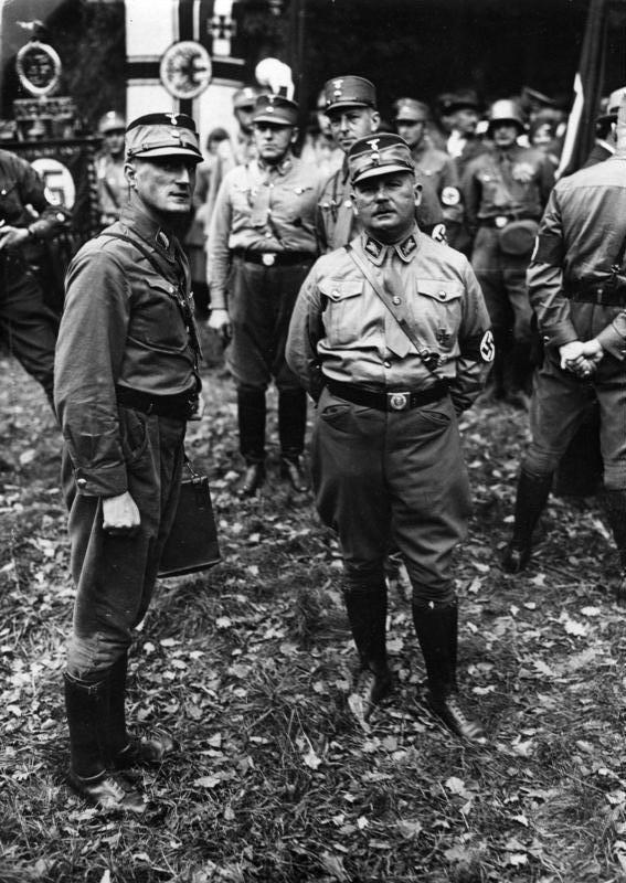 Regierungssturz in Bayern! Hauptmann Röhm der Stabschef der S.A. wurde zum Kommissar zur besonderen Verwendung in Bayern ernannt. Hauptmann Röhm mit Adjudant